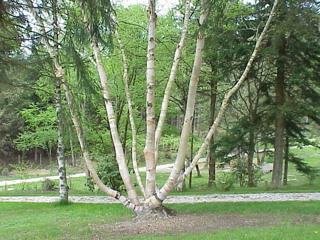 Species: Betula ermanii Family: Betulaceae Image No. 1